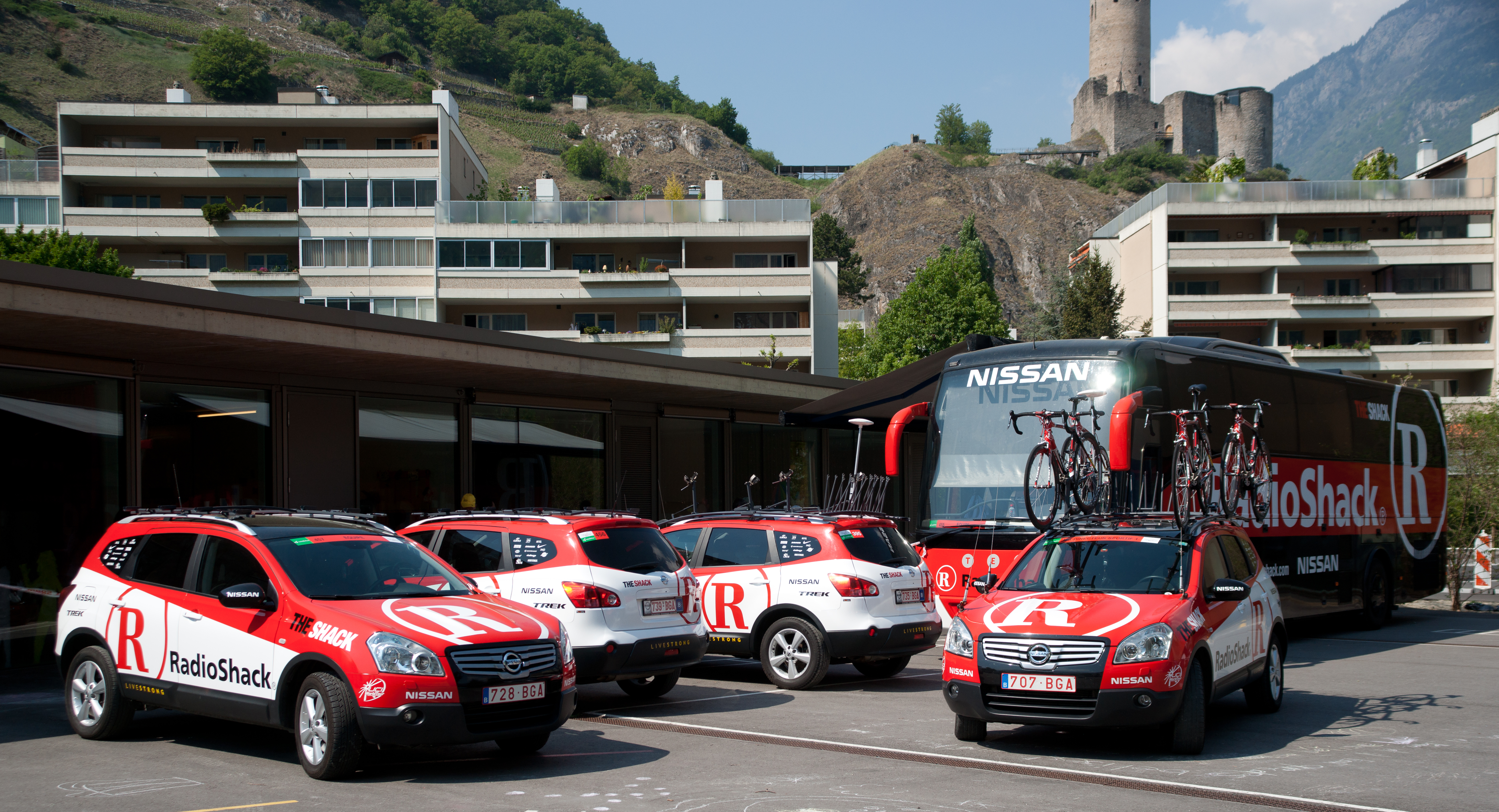 Contre la montre - Romandie 2010